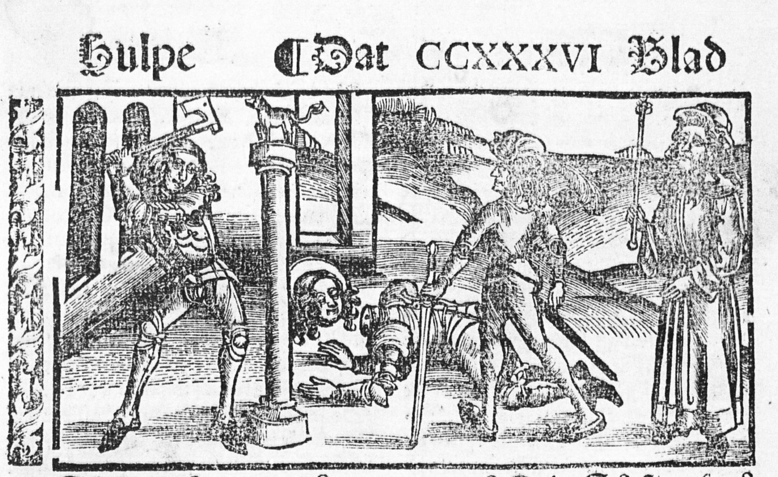 Tod des Märtyrers St. Hulpe. Holzschnitt aus dem Baseler Passional von 1517, nach dem Exemplar UB Rostock, Sign. Ff-104, Bl. 236